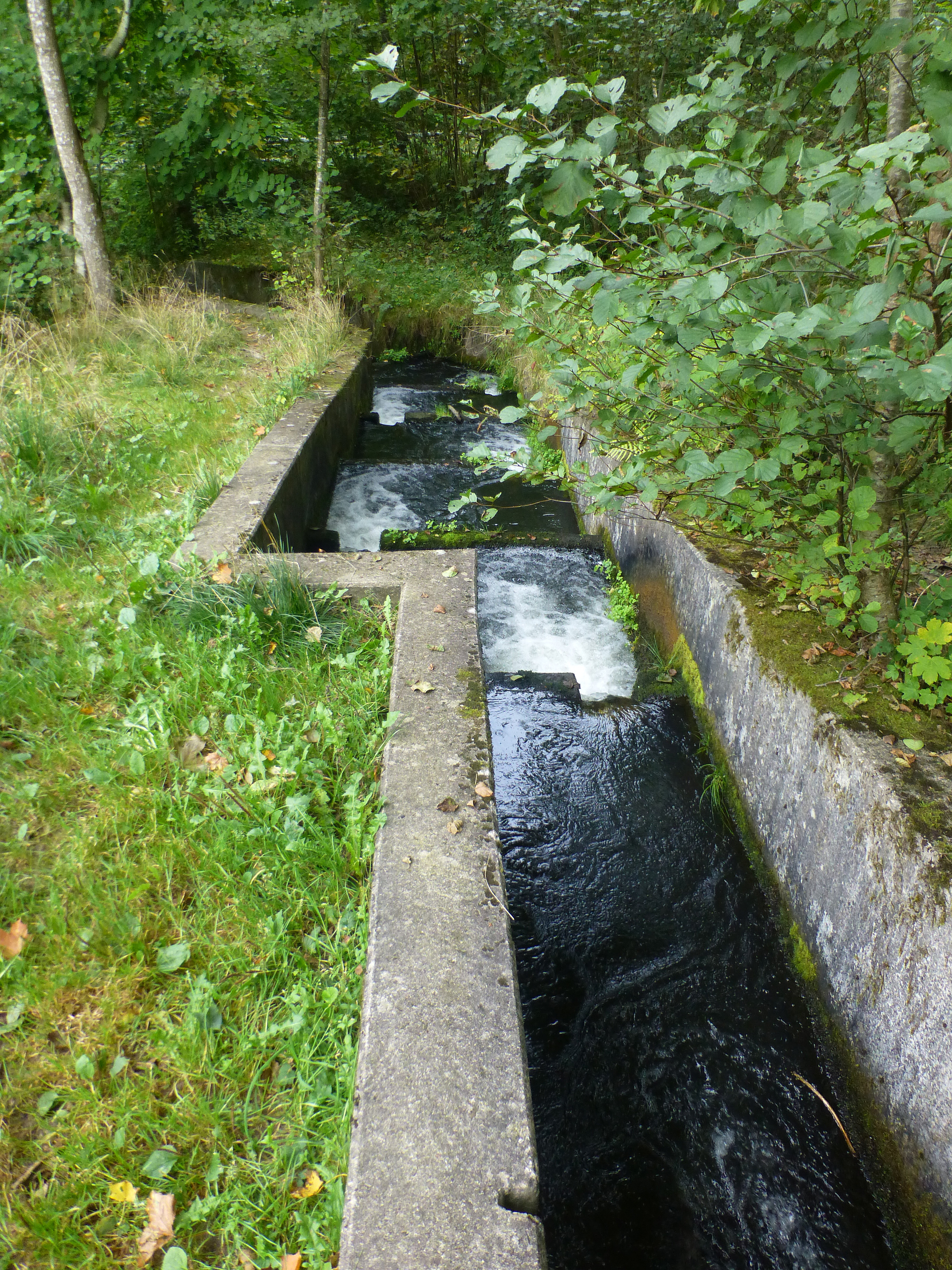 Jeksen Bæk, fisketrappe ved resterne af Kollens Mølle